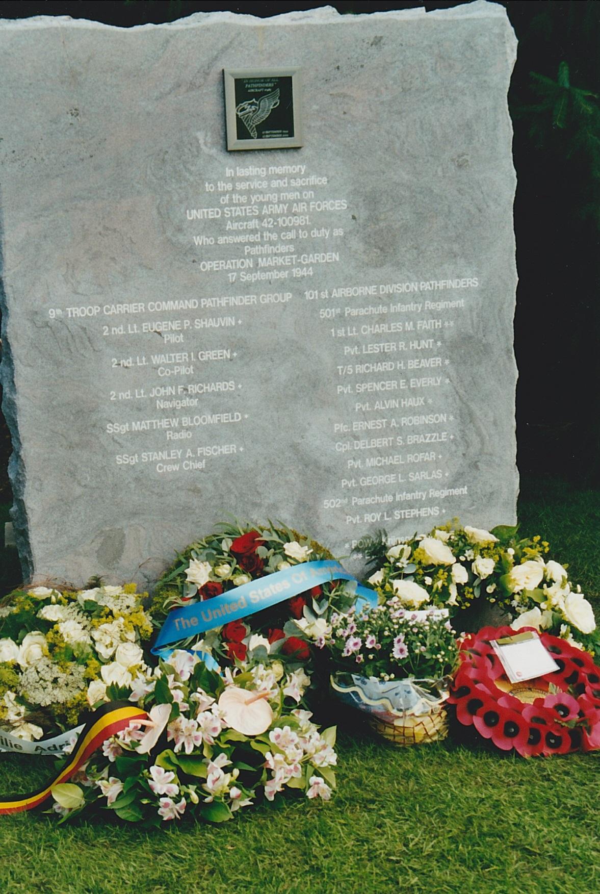 Het monument ter hoogte van Kortijnen 12, Retie